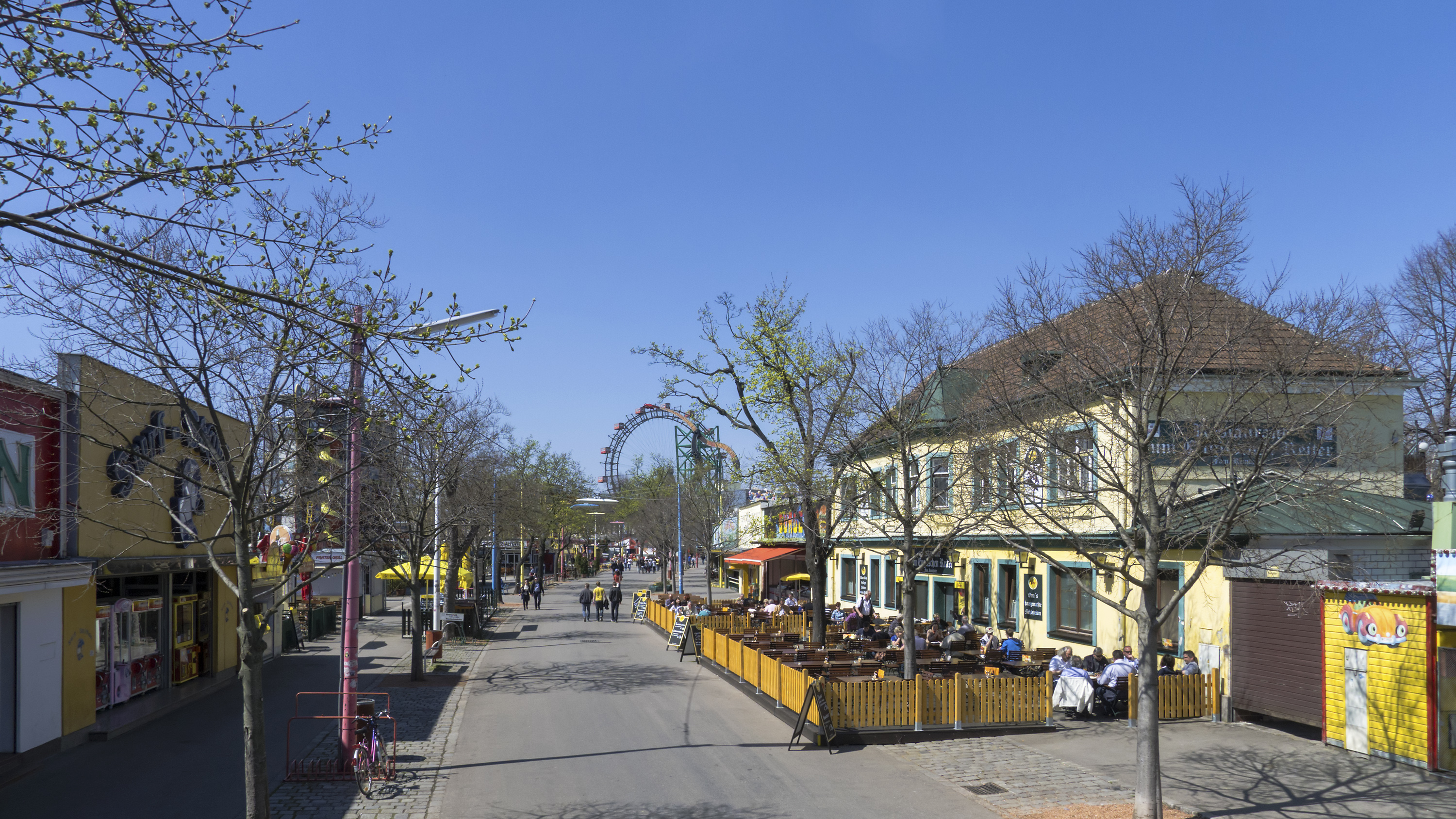 Straße des Ersten Mai in Wien 2 bei Nr. 111 Richtung Nordwesten